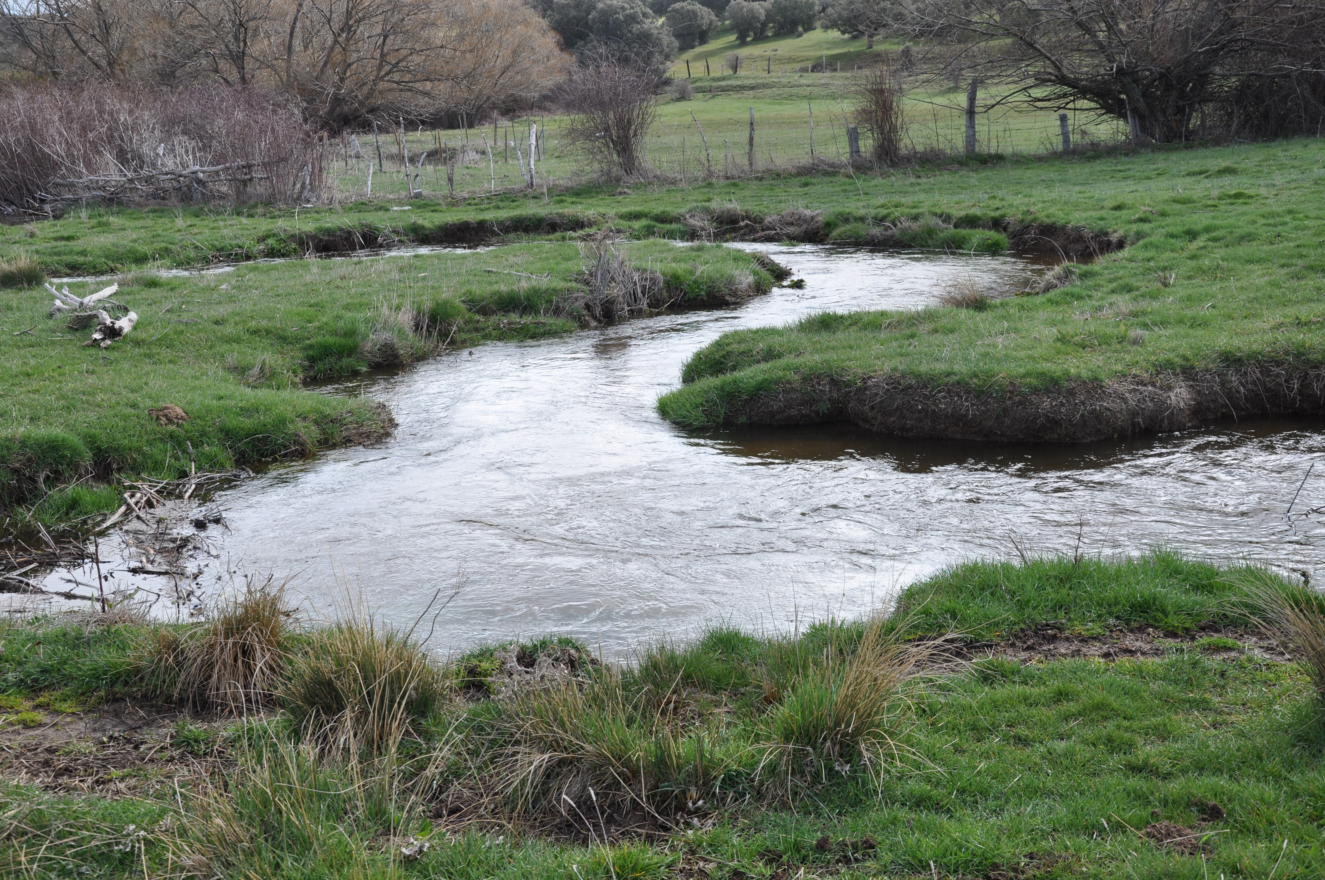 Río Almar, Ortigosa de Rioalmar, Av, España